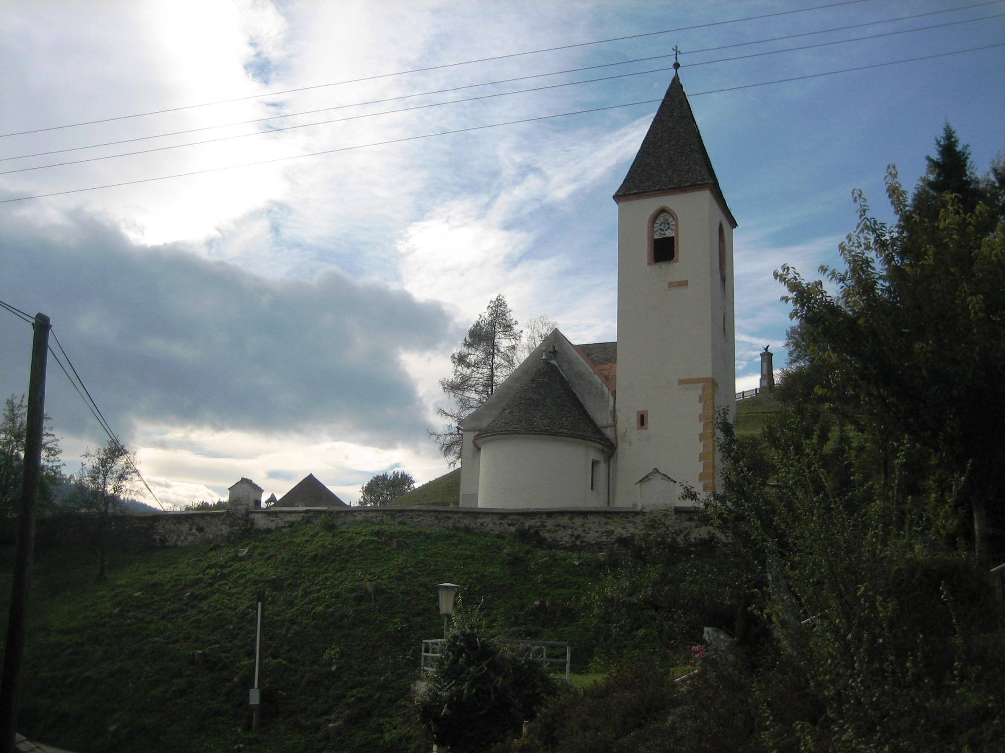 Kath. Pfarrkirche hl. Georg und Friedhof